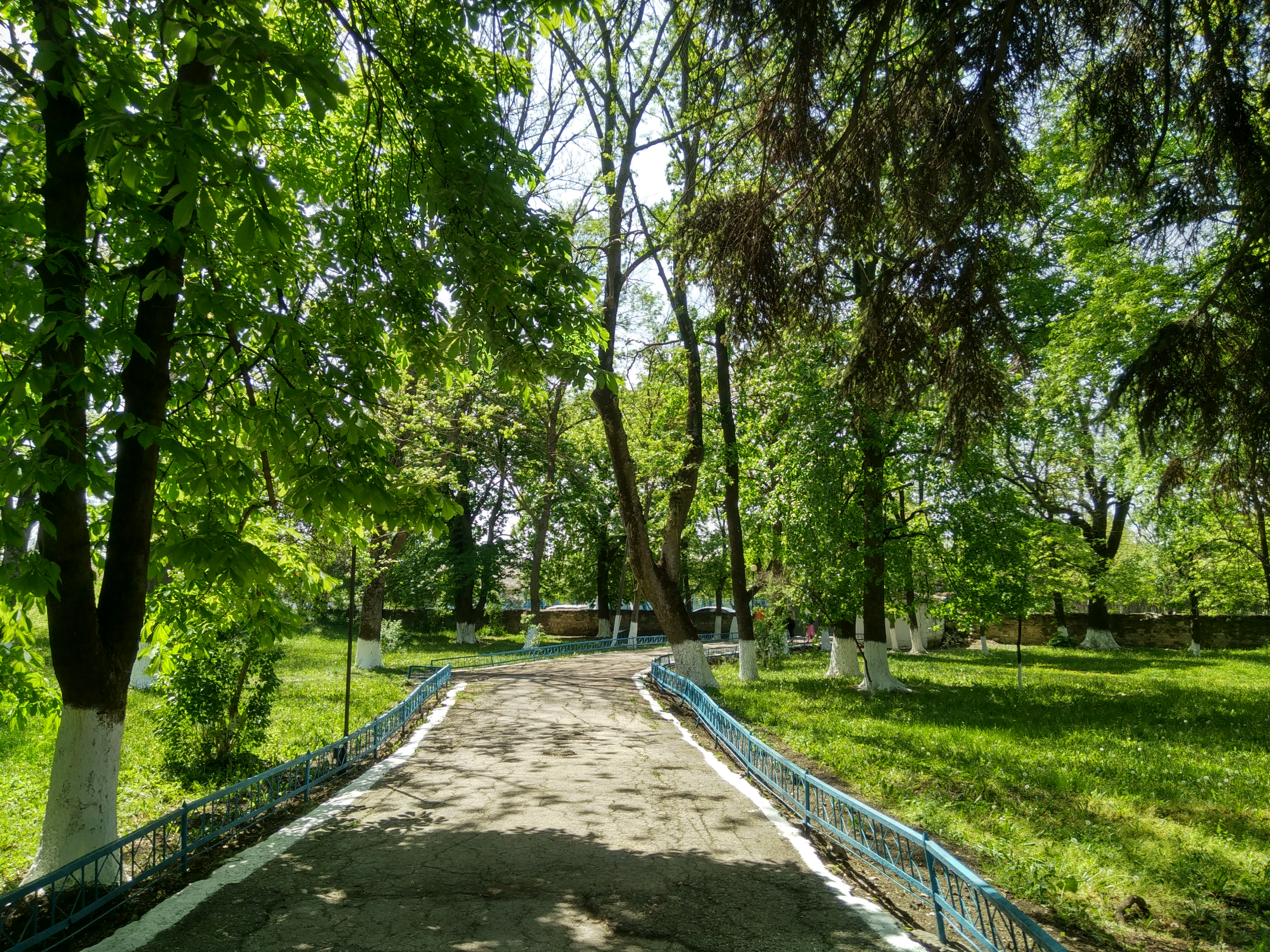 Parcul din satul Brînzeni, monument al naturii amplasat în raionul Edineț, satul Brînzeni (cod MD-ED-map-013)